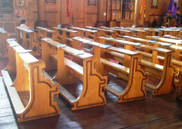 Bancos de la iglesia San Francisco, Castro, Chiloé, Chile.